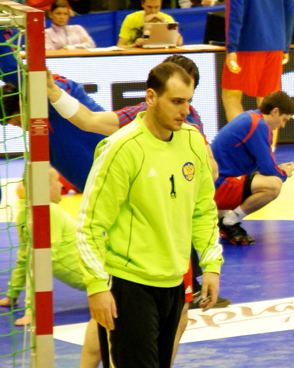 Oleg Grams Mecz Polska - Rosja, Turniej Reprezentacji Narodowych Mężczyzn w Piłce Ręcznej, Hala widowiskowo-sportowa Arena, Poznań, Polska.